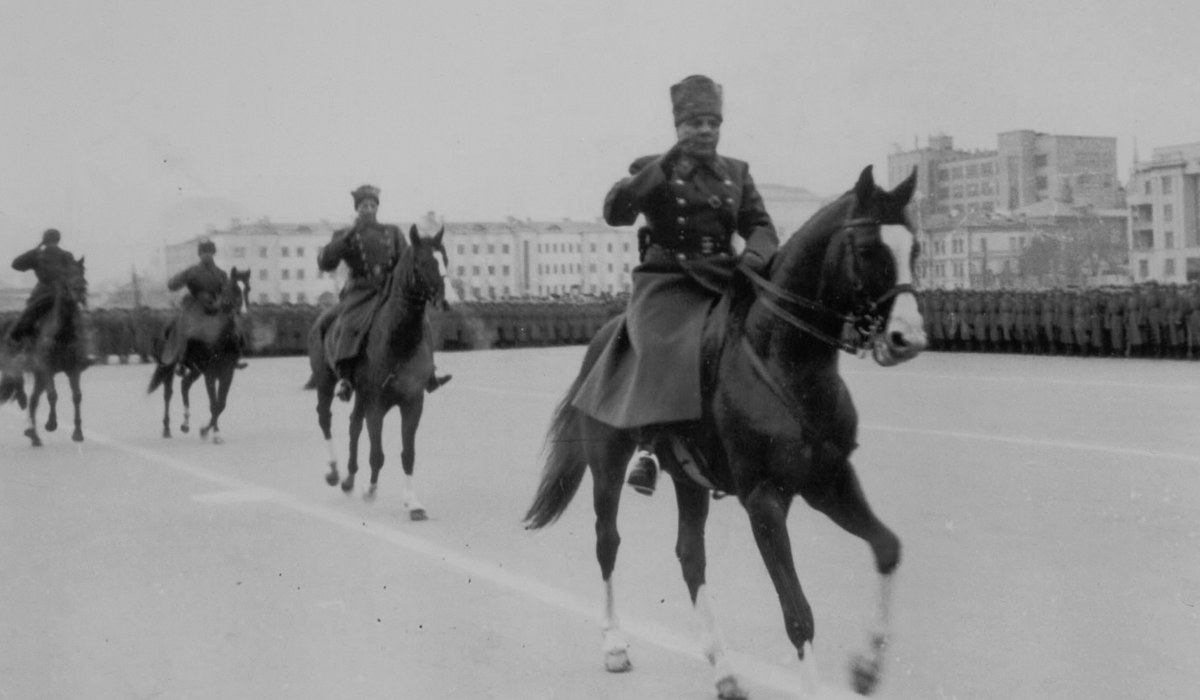 Маршал К. Ворошилов и генерал-лейтенант М. Пуркаев объезжают войска. Военный парад в Куйбышеве 7 ноября 1941 г.